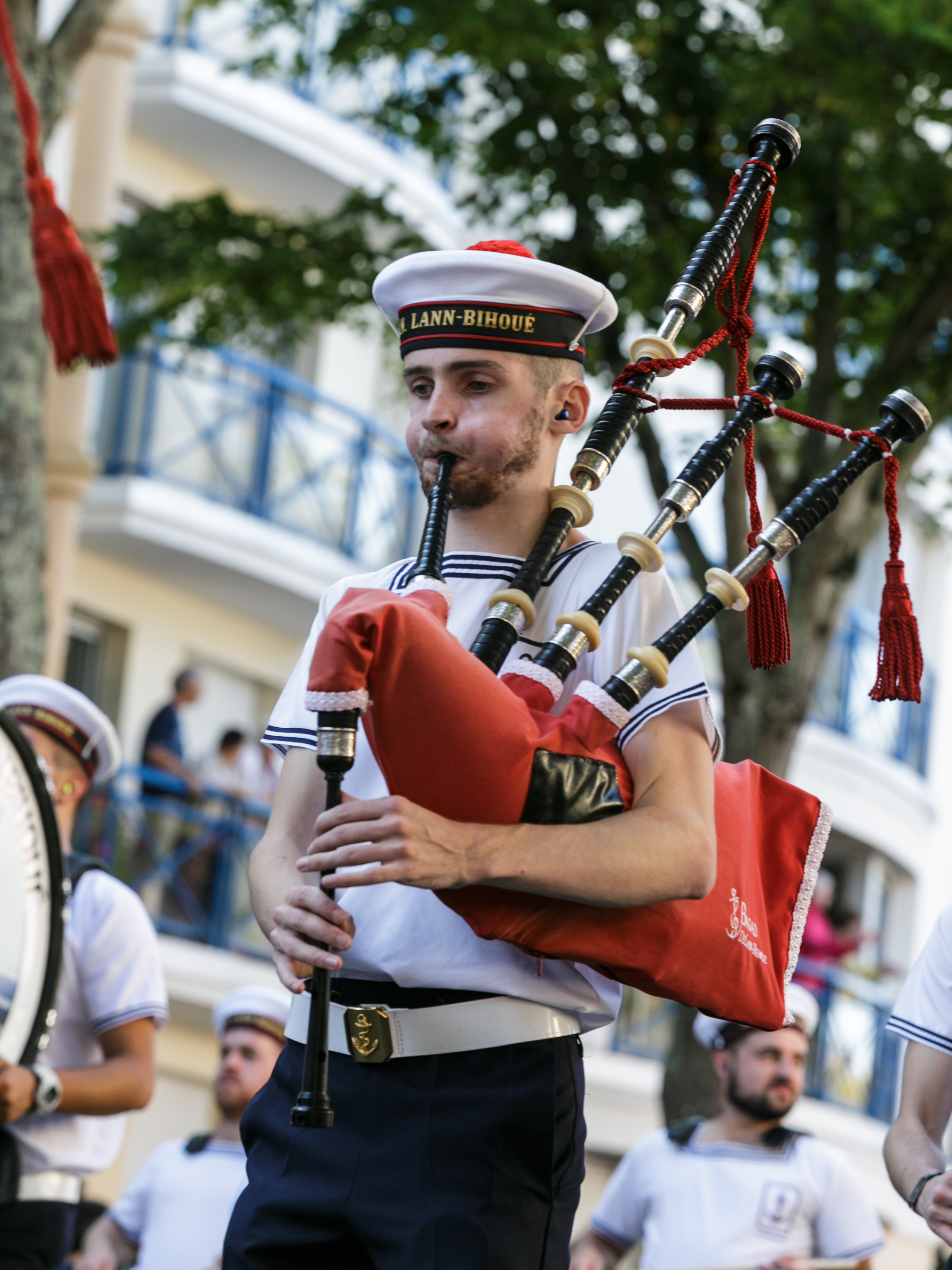 Festival Interceltique de Lorient 2017 - Grande parade des nations celtes - Bagad de Lann Bihoué